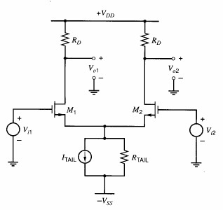 N-kanalni MOS diferencijalni pojačavač